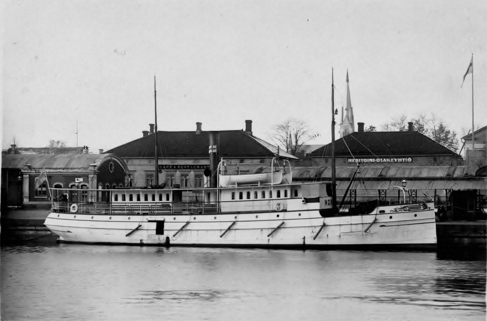 s/s Norden vaakahuoneella 1920 tai -30 luvulla